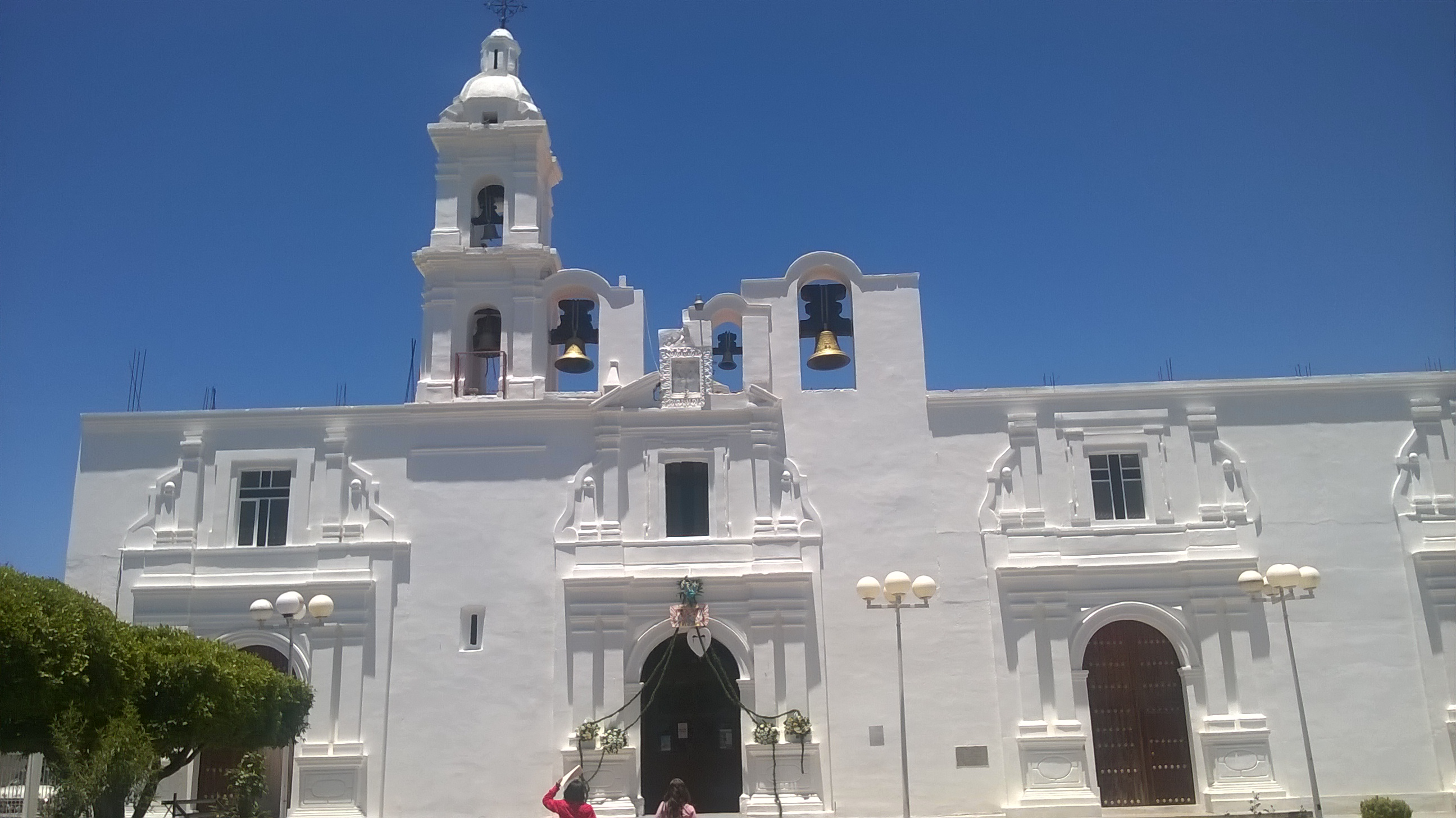 Parroquia de San Cosme, Mazatecochco, Tlaxcala